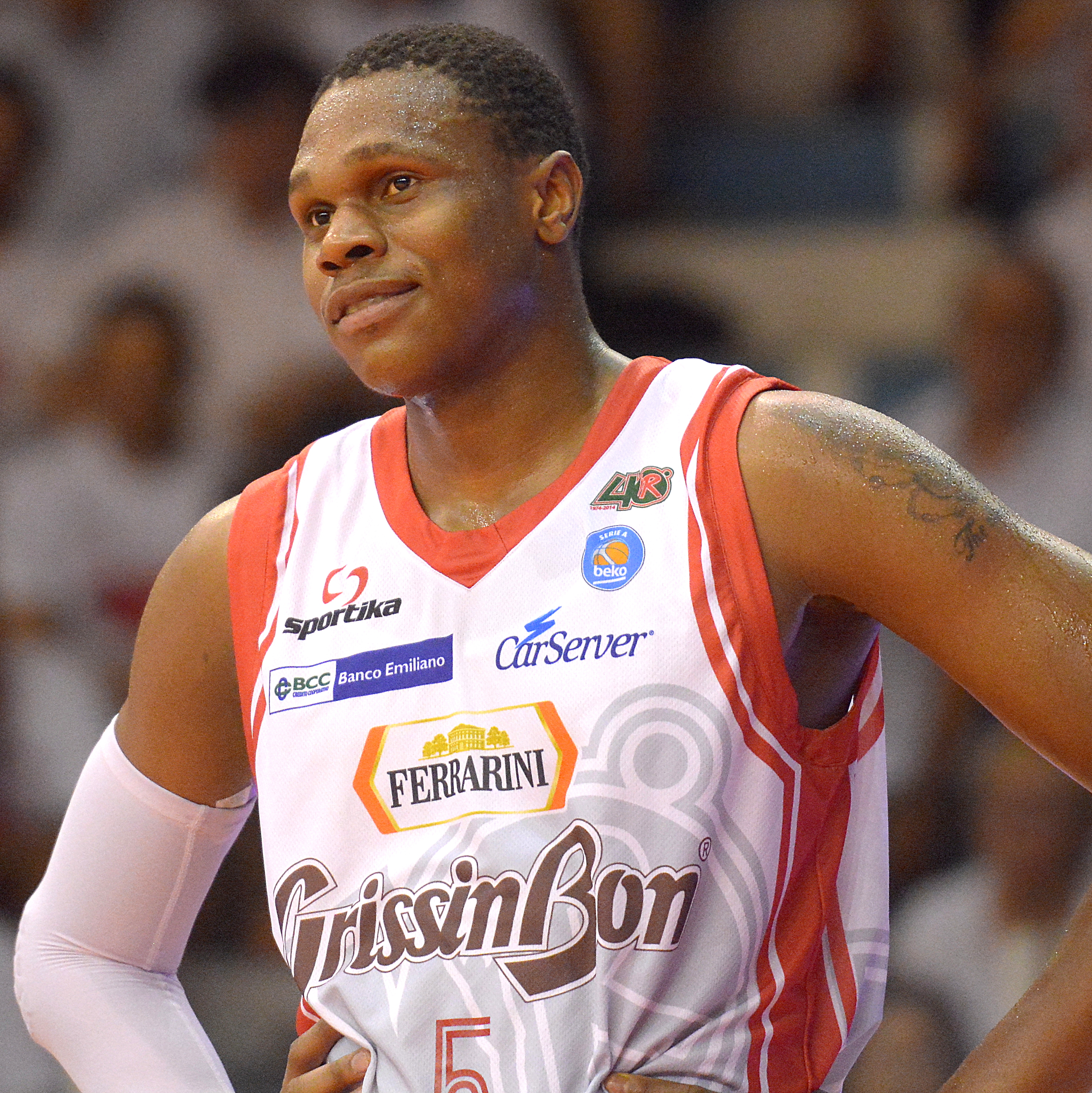 Vitalis Chikoko con la maglia di Reggio Emilia